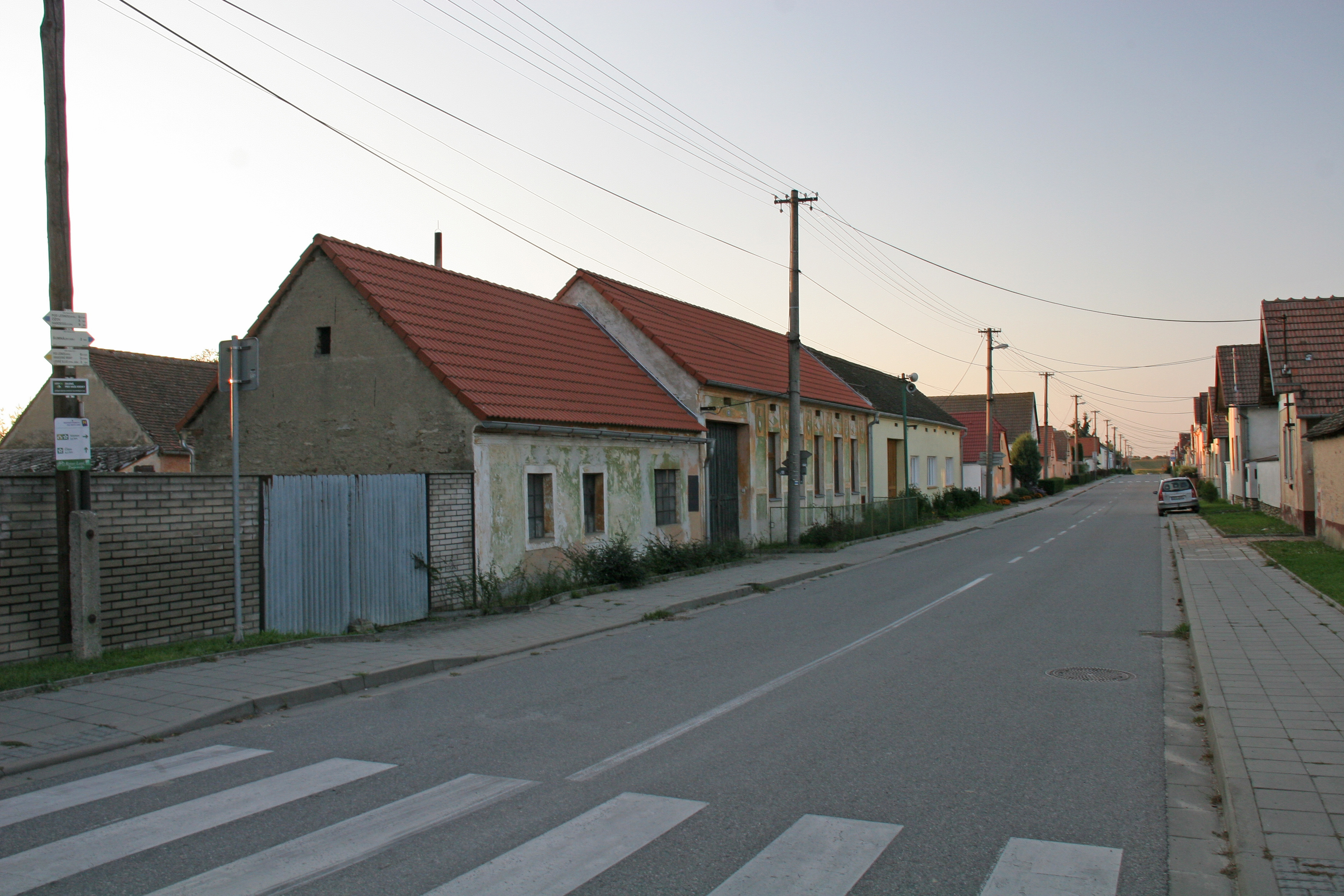 Lesná čp. 61